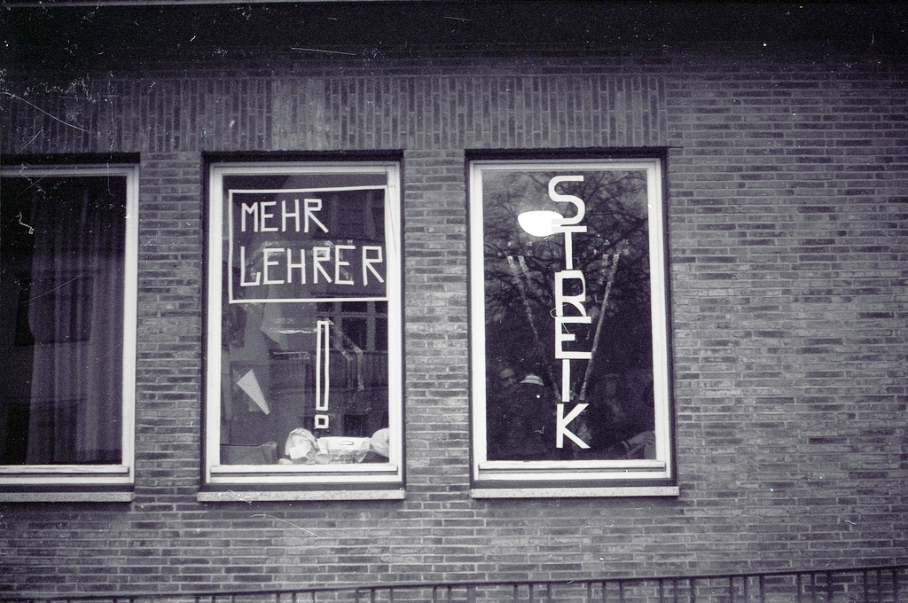 Die Fenster des Raumes der Schülerselbstverwaltung des Wilhelmsgymnasiums in Kassel rufen im Herbst 1977 zum Schulstreik auf.